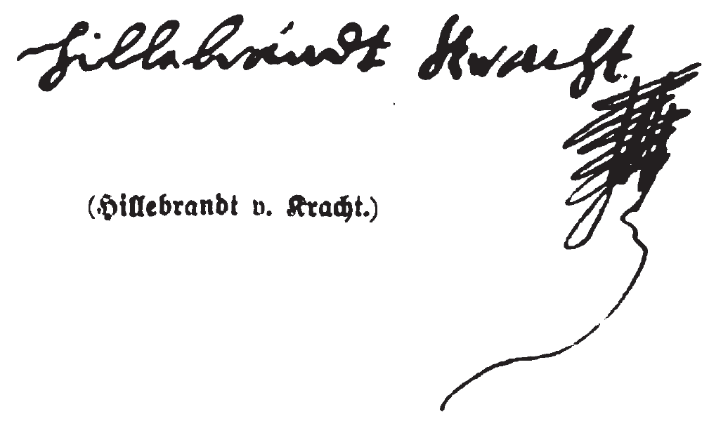 Unterschrift des Hildebrand von Kracht (1573 - 1638), brandenburgischer Offizier und Oberhauptmann von Cüstrin